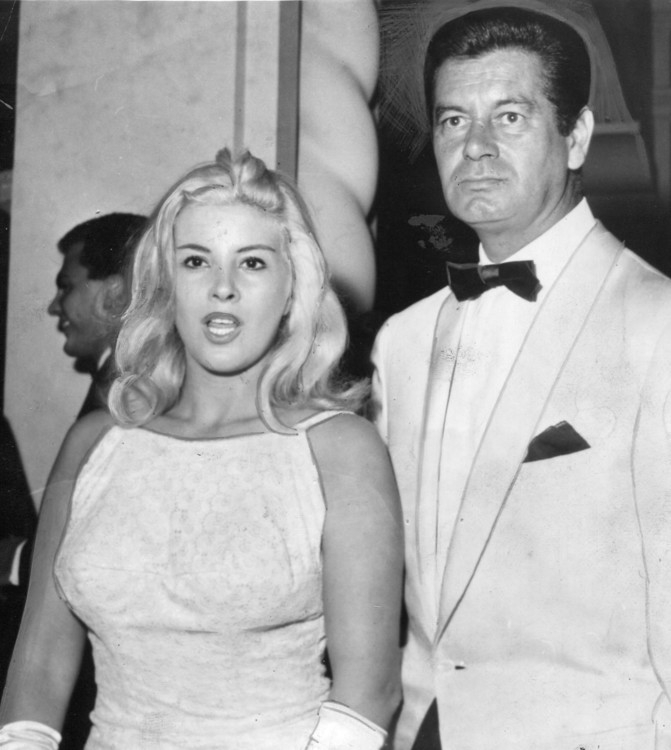 Libertad Leblanc y José Suárez.